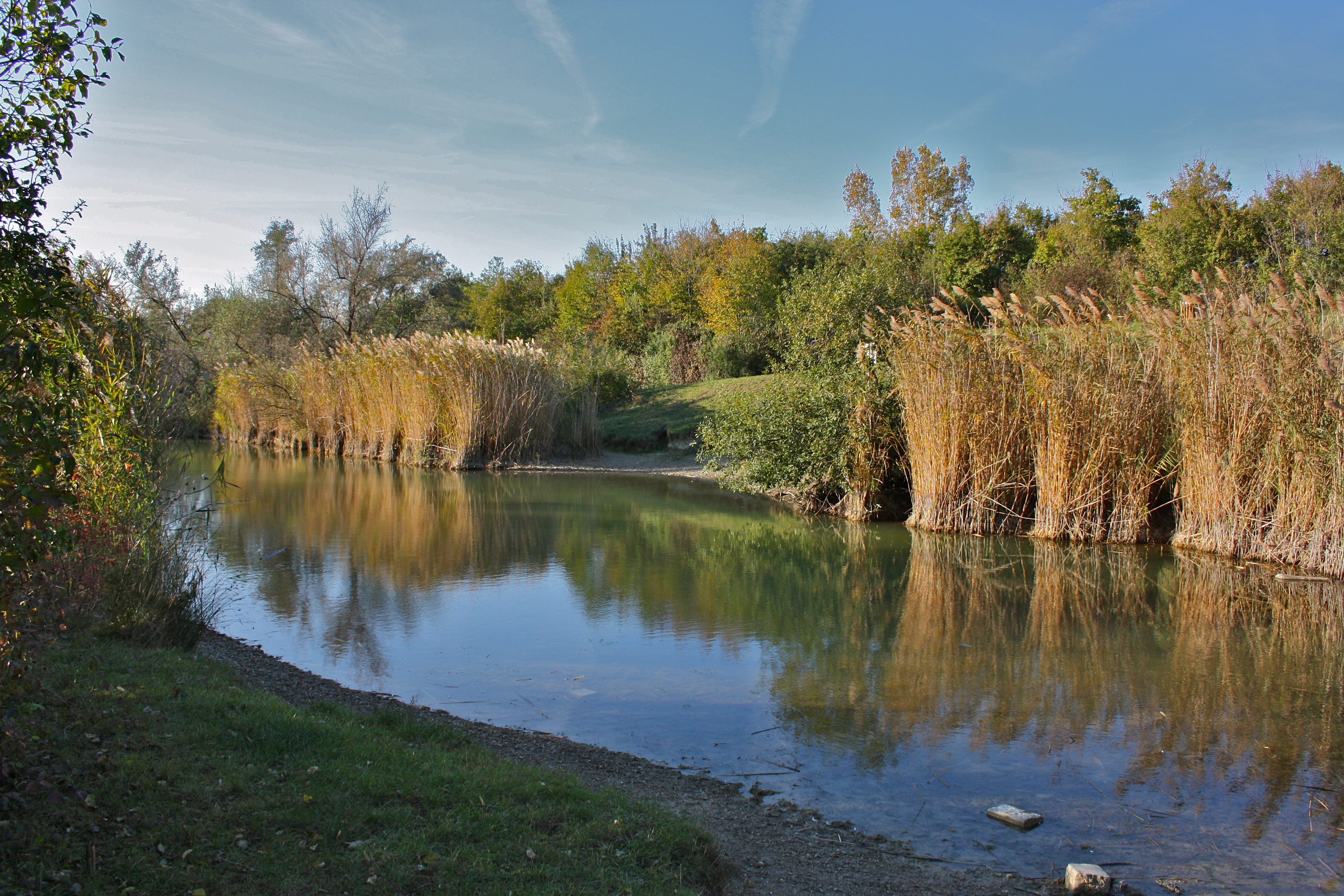 Überflutungsbecken der Liesing in Neusteinhof, Wien.